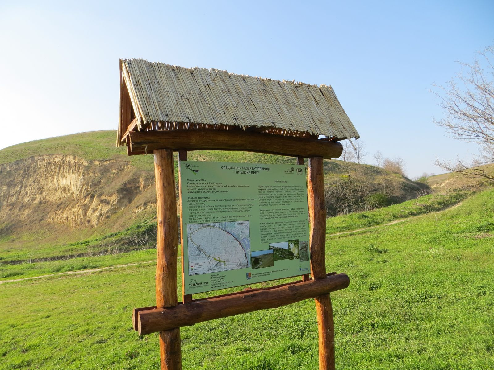 Specijalni rezervat prirode "Titelski breg"